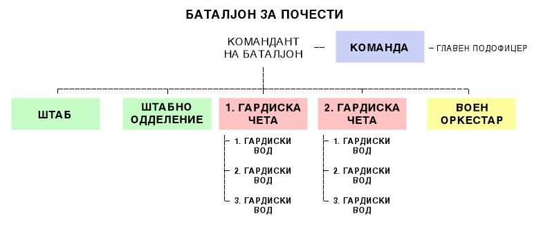 Визуелен приказ на структурата на Баталјонот за почести при Армијата на Република Македонија